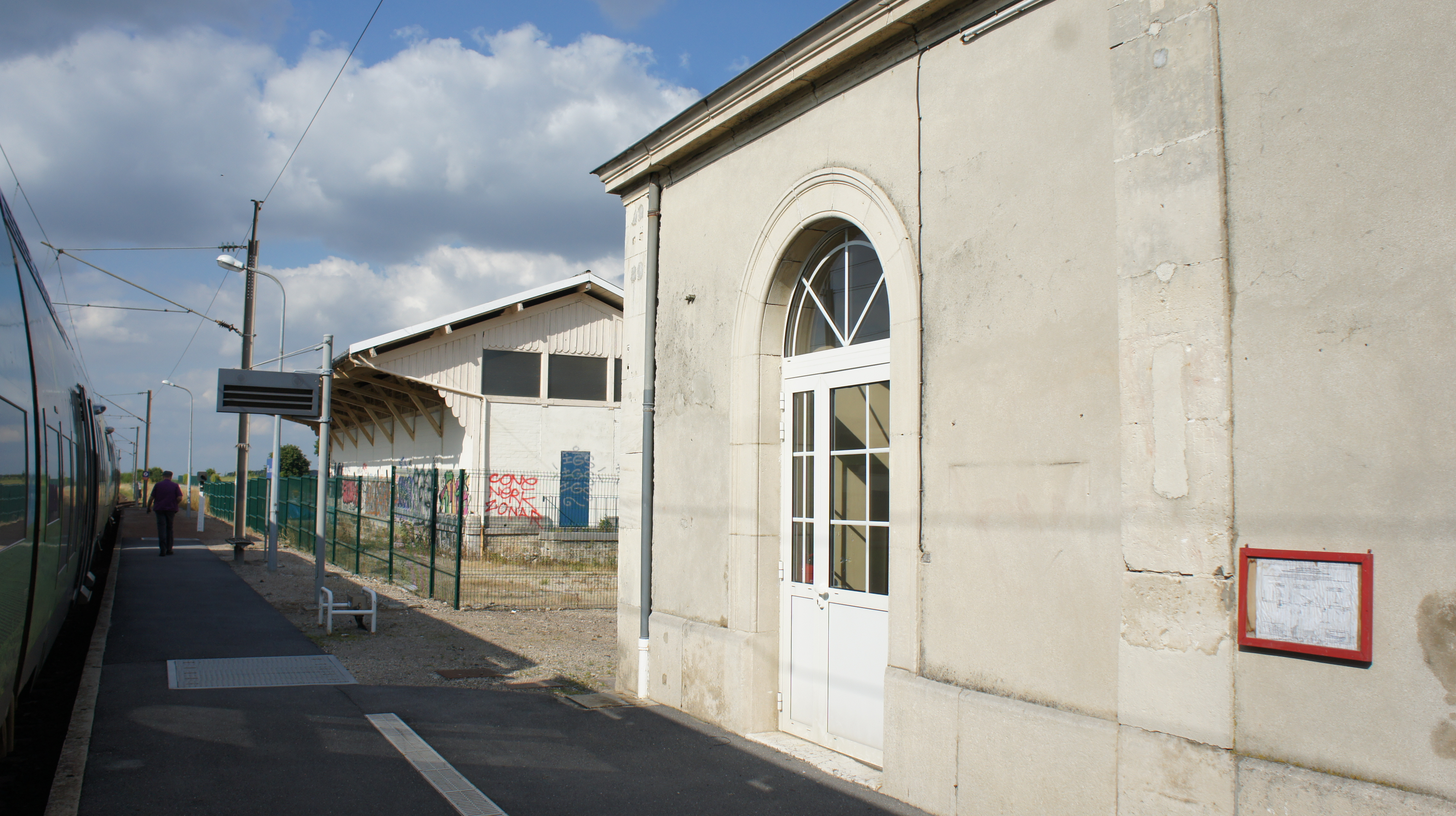 Gare de Rilly-la-Montagne.